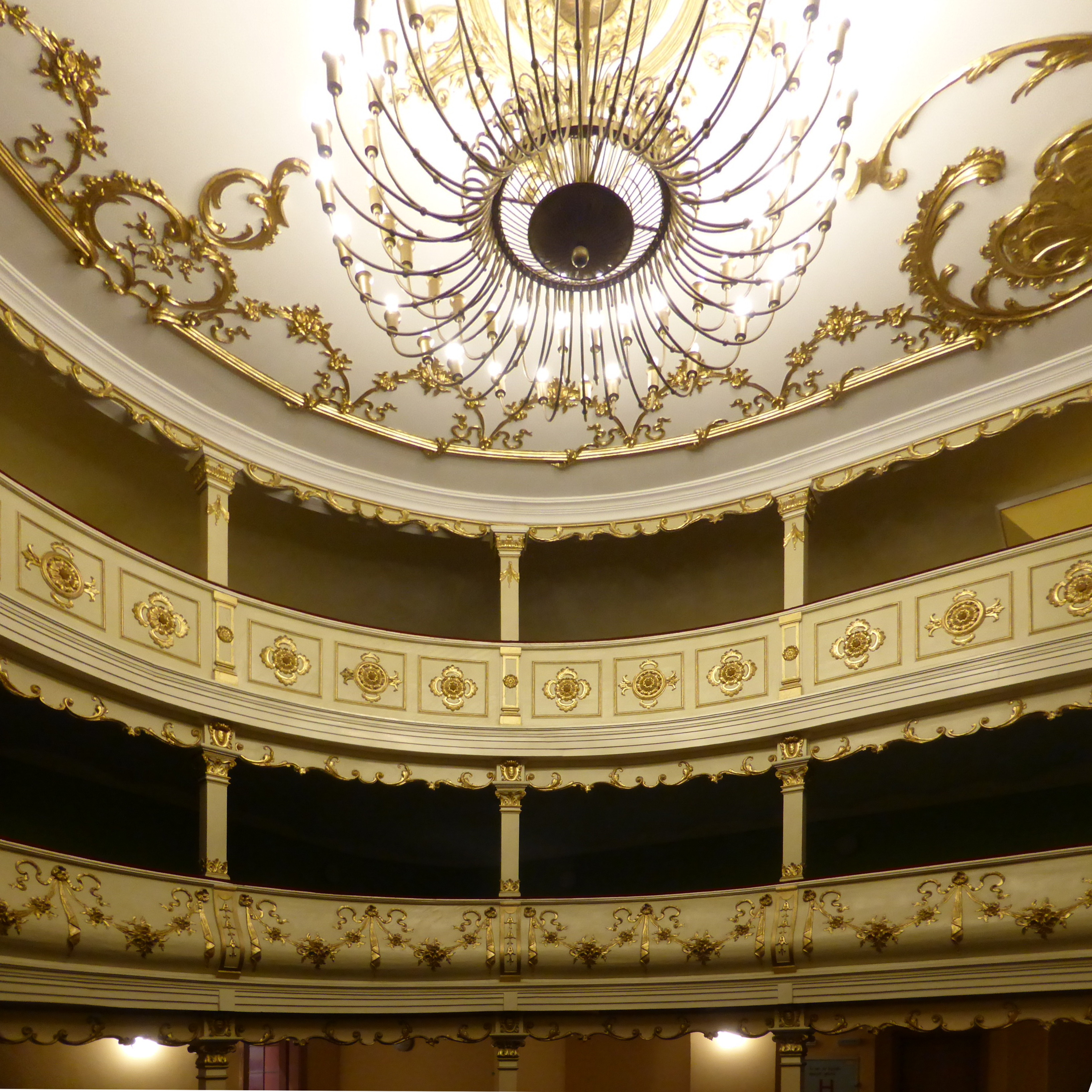 Der Saal des Stadttheaters von Oravița (RO).